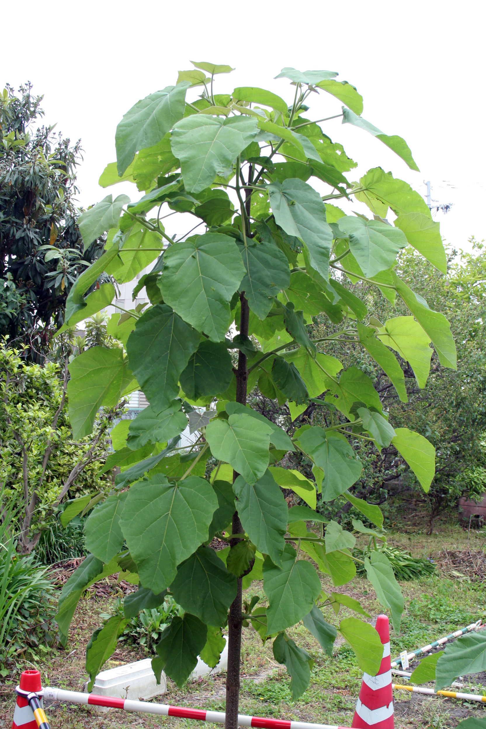 発芽後2年目の桐の木。